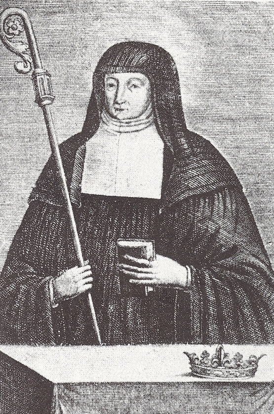 Charlotte Flandrina van Nassau (1579-1640), op een 17e eeuwse tekening.